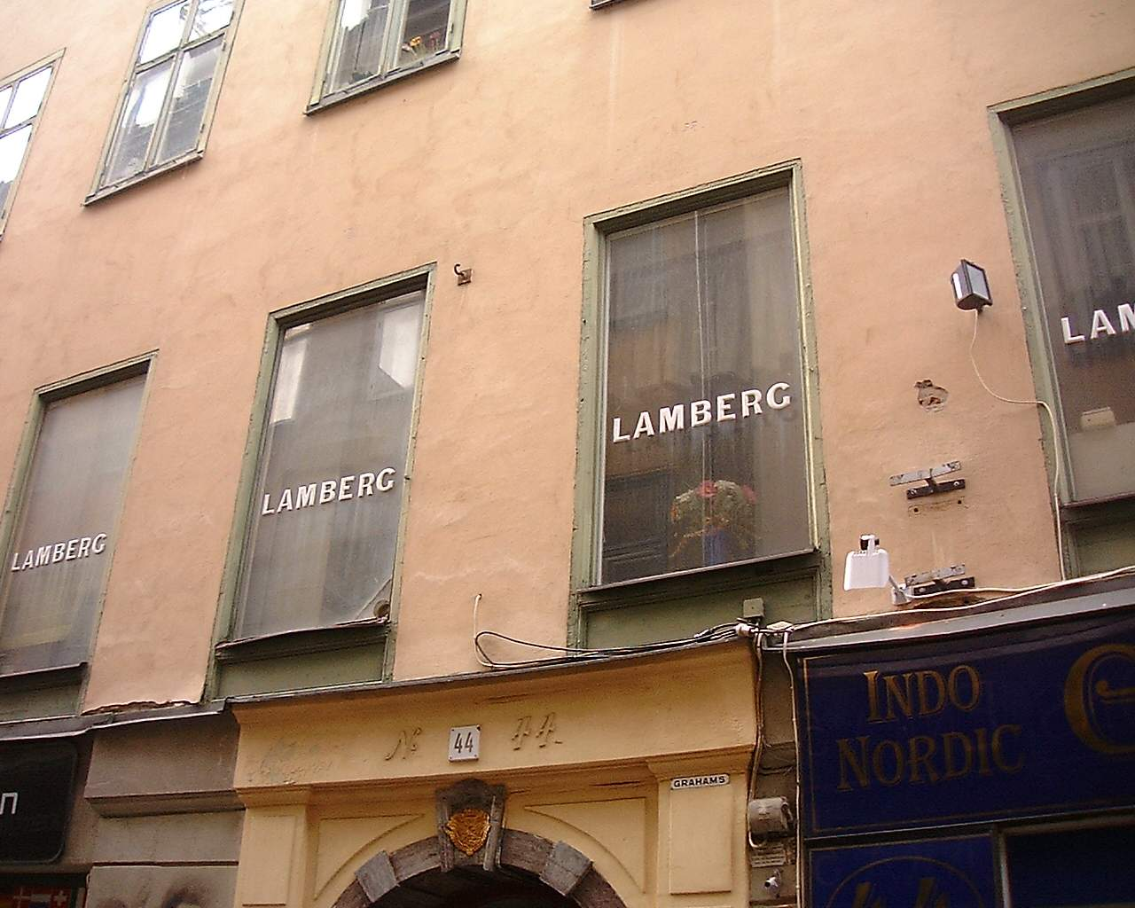 Front of 44, Västerlånggatan. Gamla stan, Stockholm.